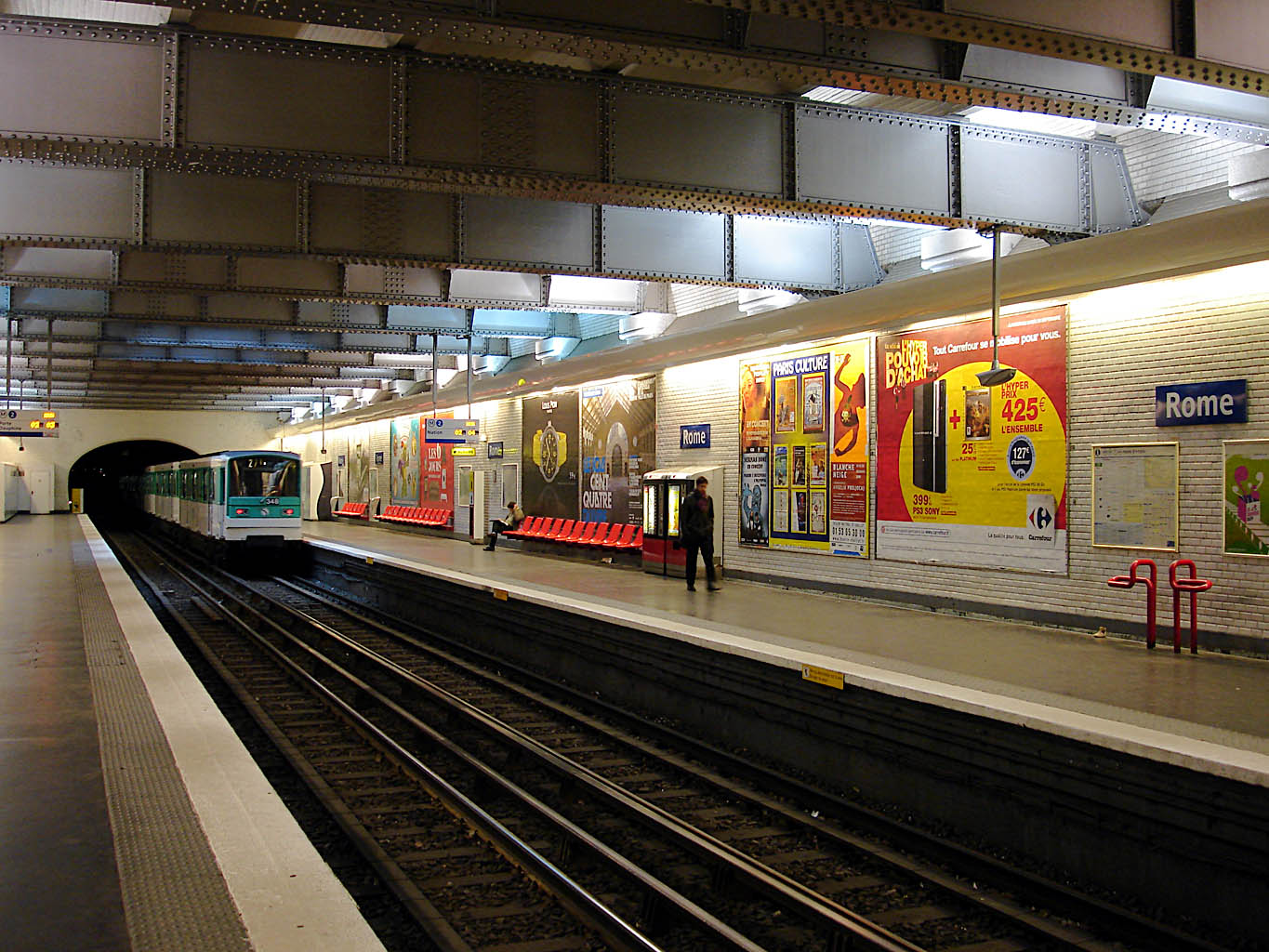 Station Rome de la ligne 2 du métro de Paris, France.